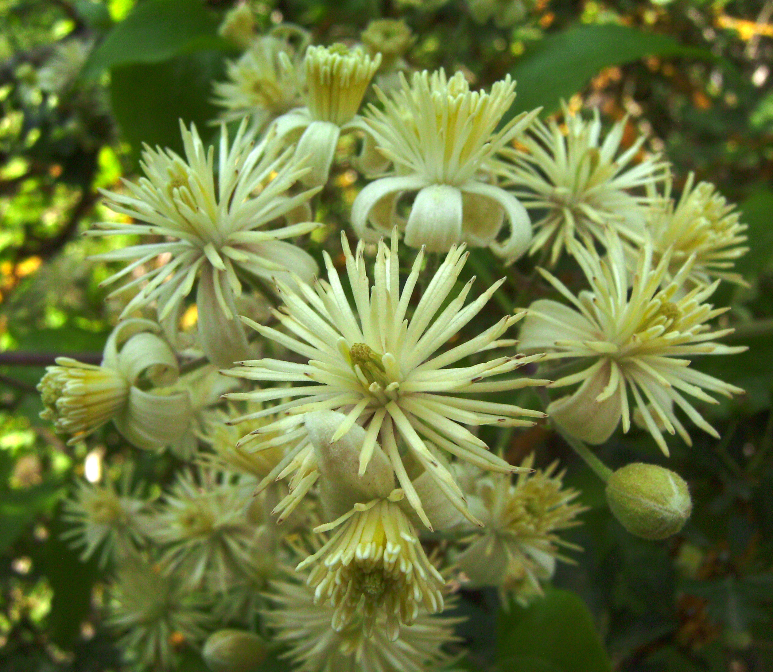 Clematis vitalba flowers, Castelltallat, Catalonia